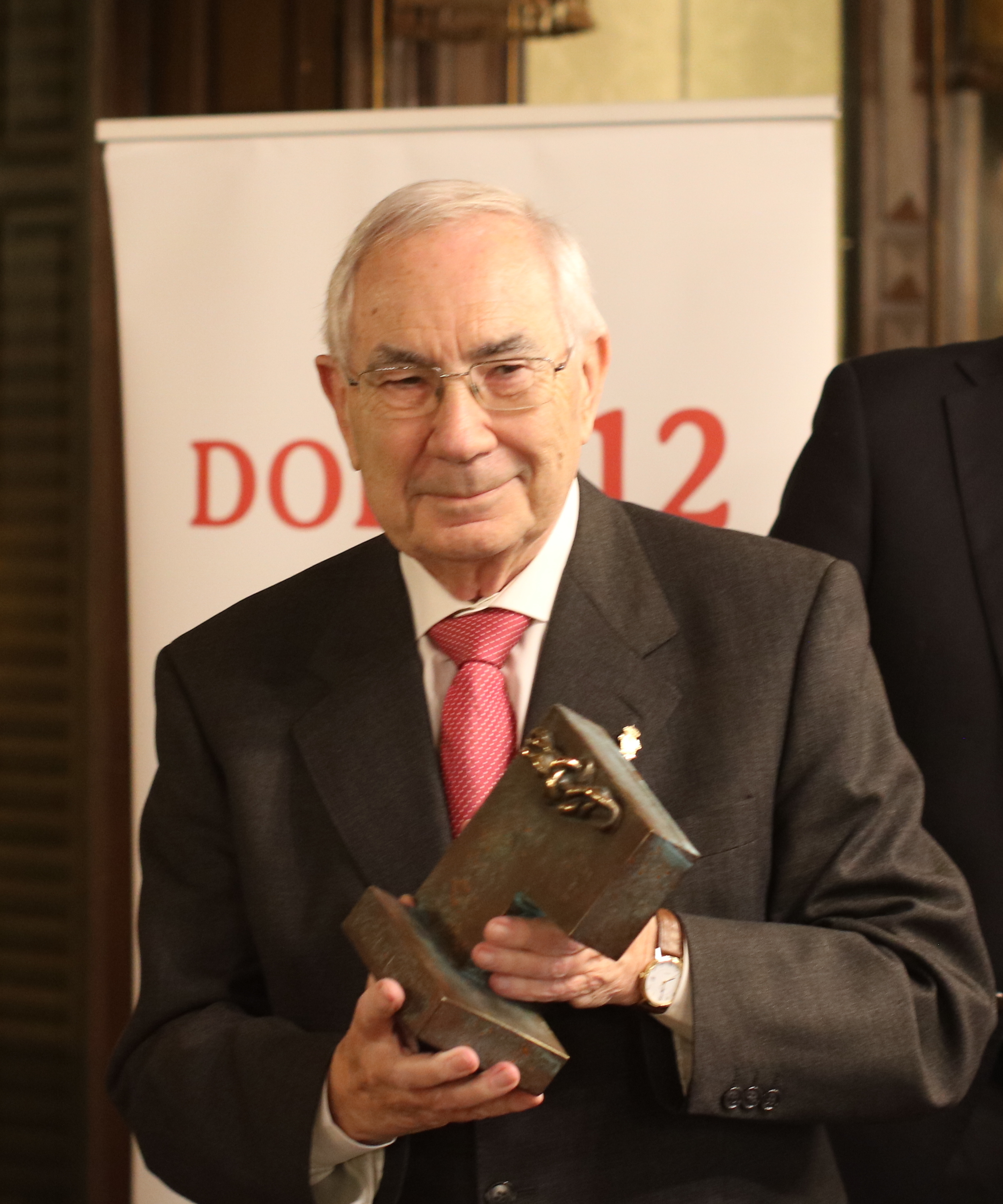 Nicolás Garcia Tapia con el Premio Cadenas de Navarra